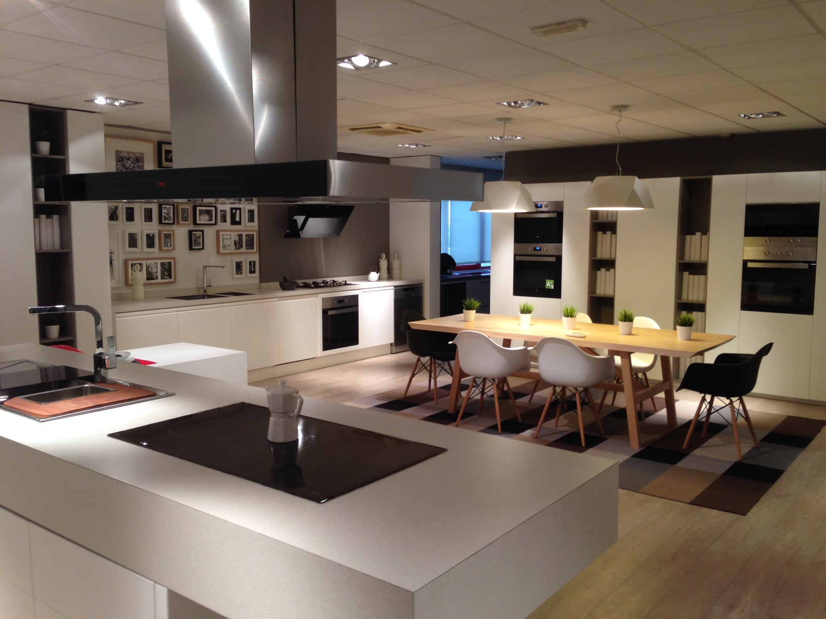 Showroom Teka